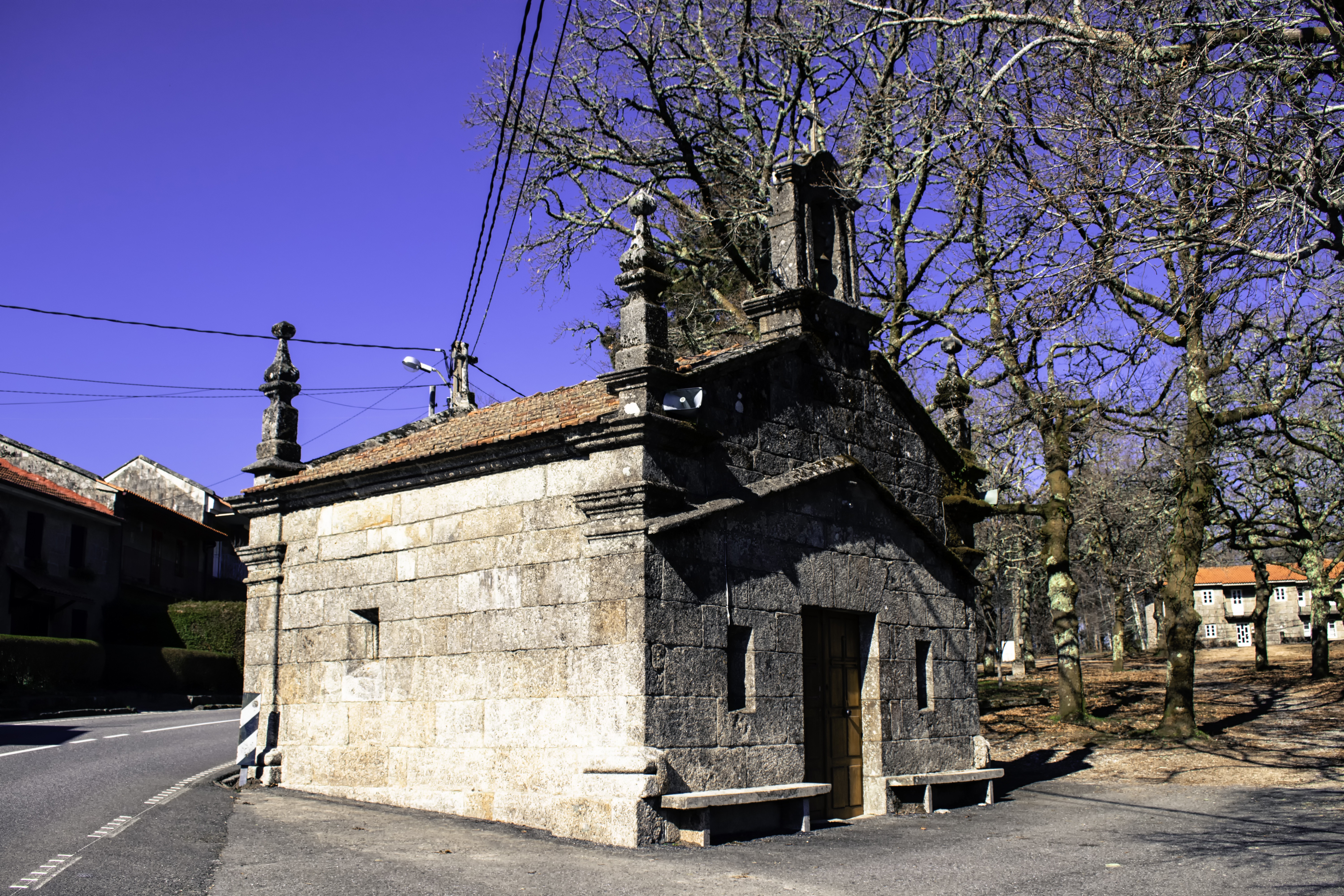 Capela de Santa Lucía en Famelga, Cerdedo-Cotobade.